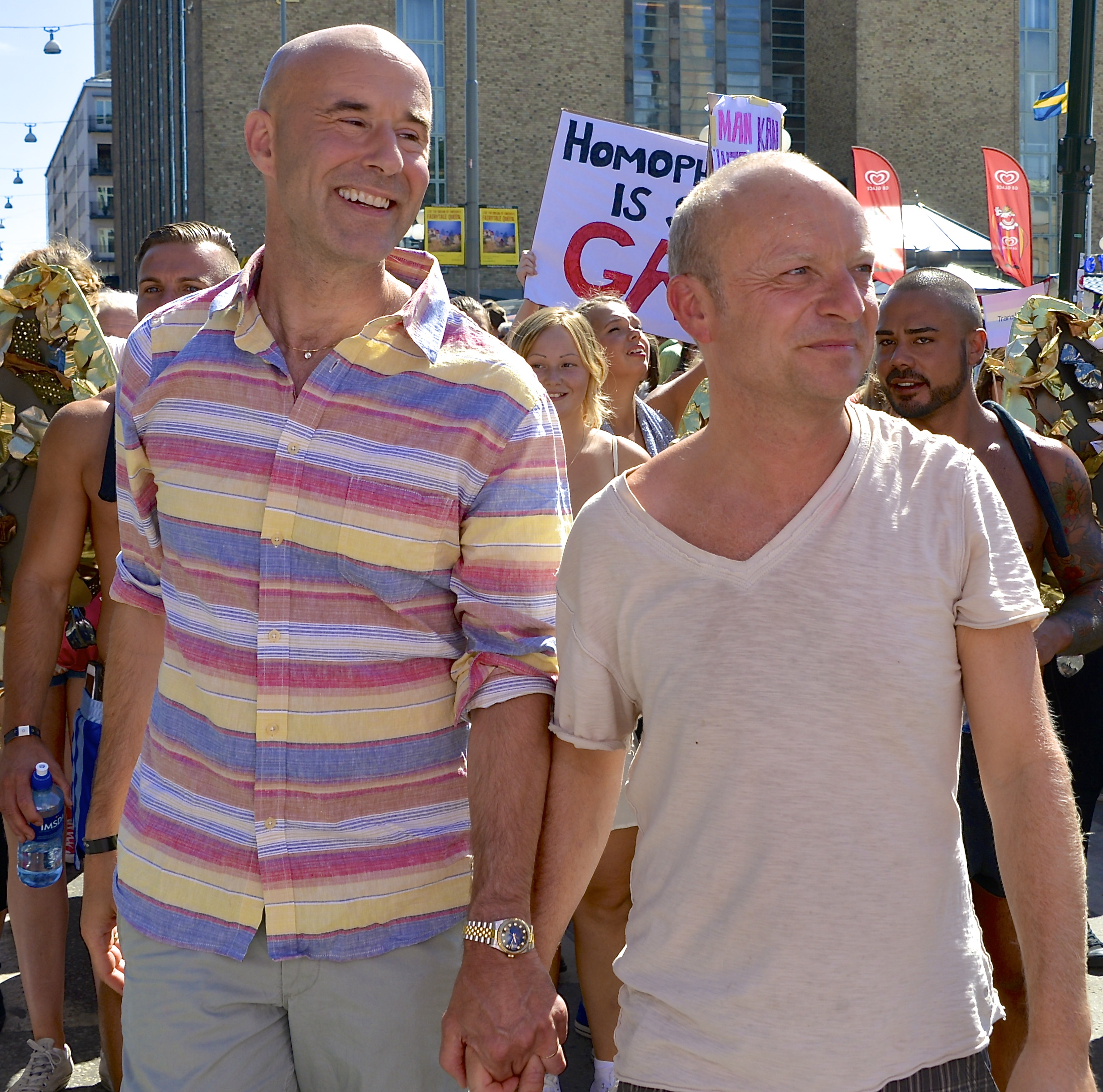 Mark Levengood & Jonas Gardell i den avslutande Prideparaden under Stockholm Pride 2013.